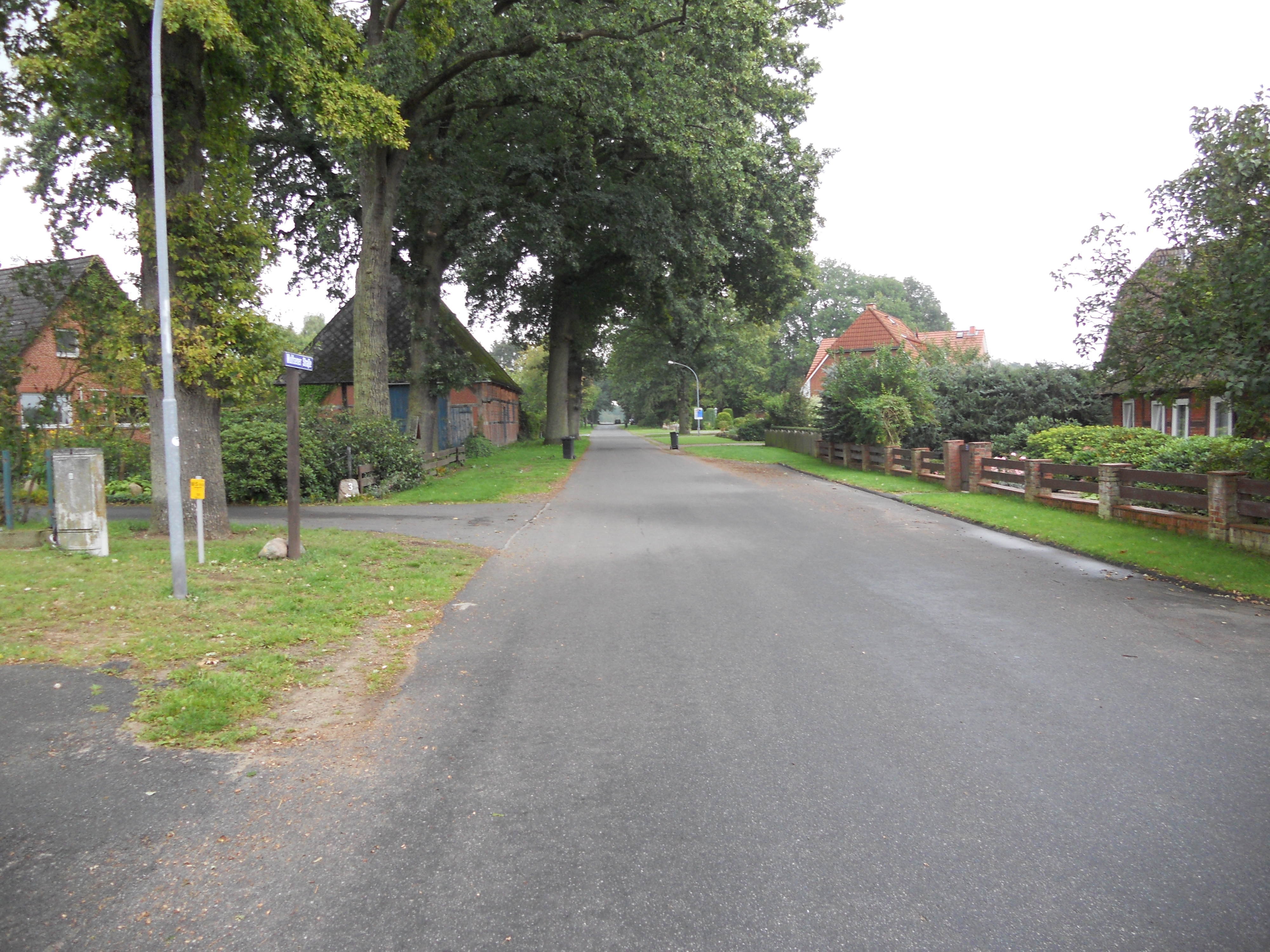 Straßenansicht Tangendorf